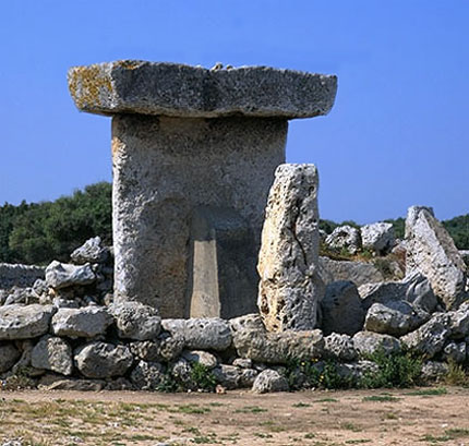 Trepuco (Sonstiges:wurde im WWW von mir schon auf eigener Page eingestellt.)